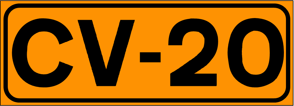 Inidcador de la Carretera de la Comunidad Valenciana CV-20